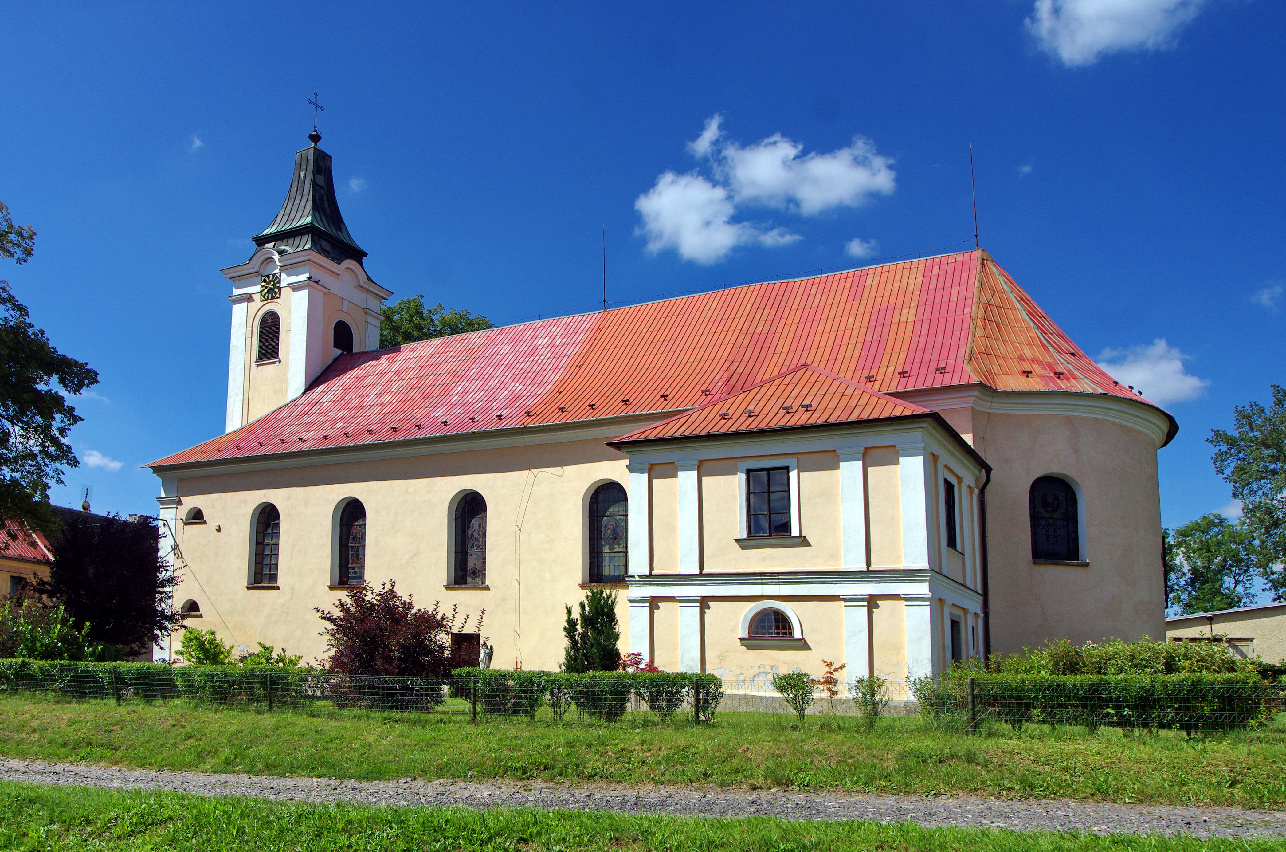 Kostel Povýšení svatého Kříže, Nový Kostel.